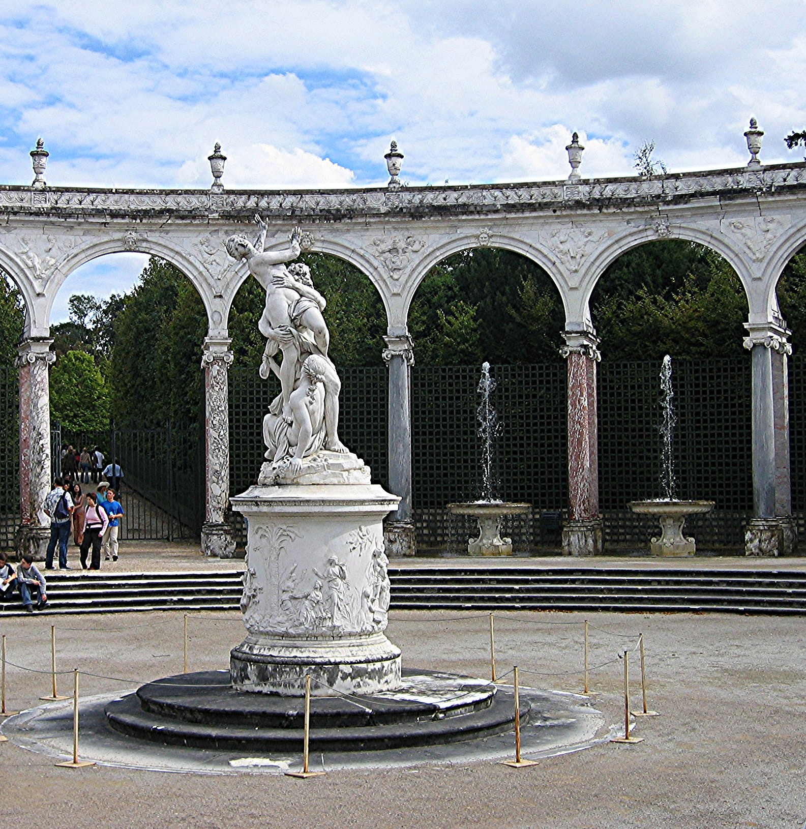 Colonnade, , jardins de CCA de Ravel / Photographie personnelle prise par G. Puissant / Copyright Sept 2004 Puissant ; Septembre 2004 Catégorie:Image du parc de Versailles